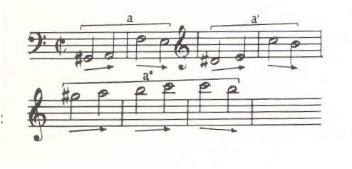 openingsthema 15e strijkkwartet in a van Beethoven